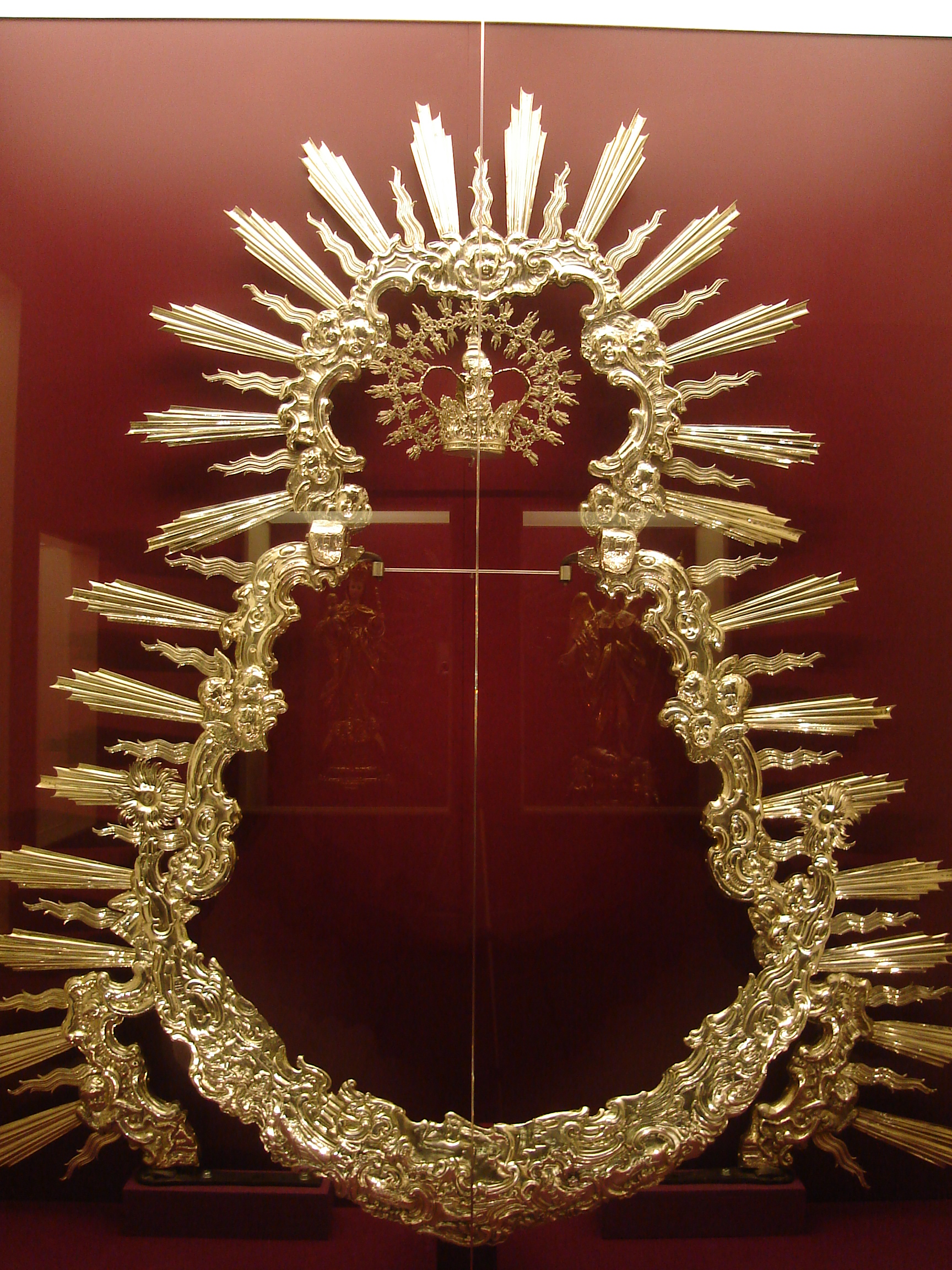 Ráfaga, corona y media luna de Ntra. Sra. de la Soledad de Écija, obra realizada por el platero cordobés Damián de Castro en plata.